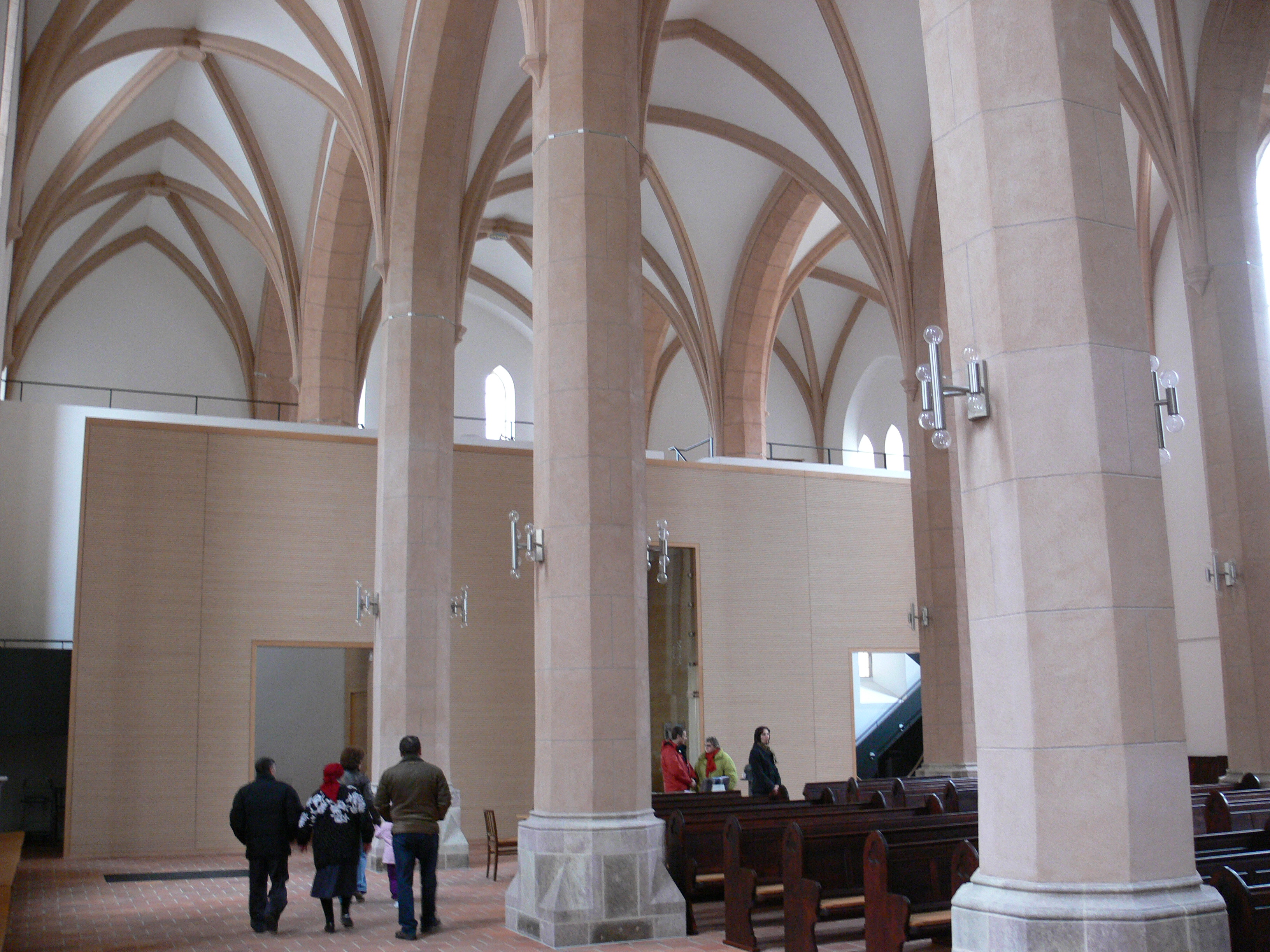 Stadtkirche St. Jakobi, Chemnitz